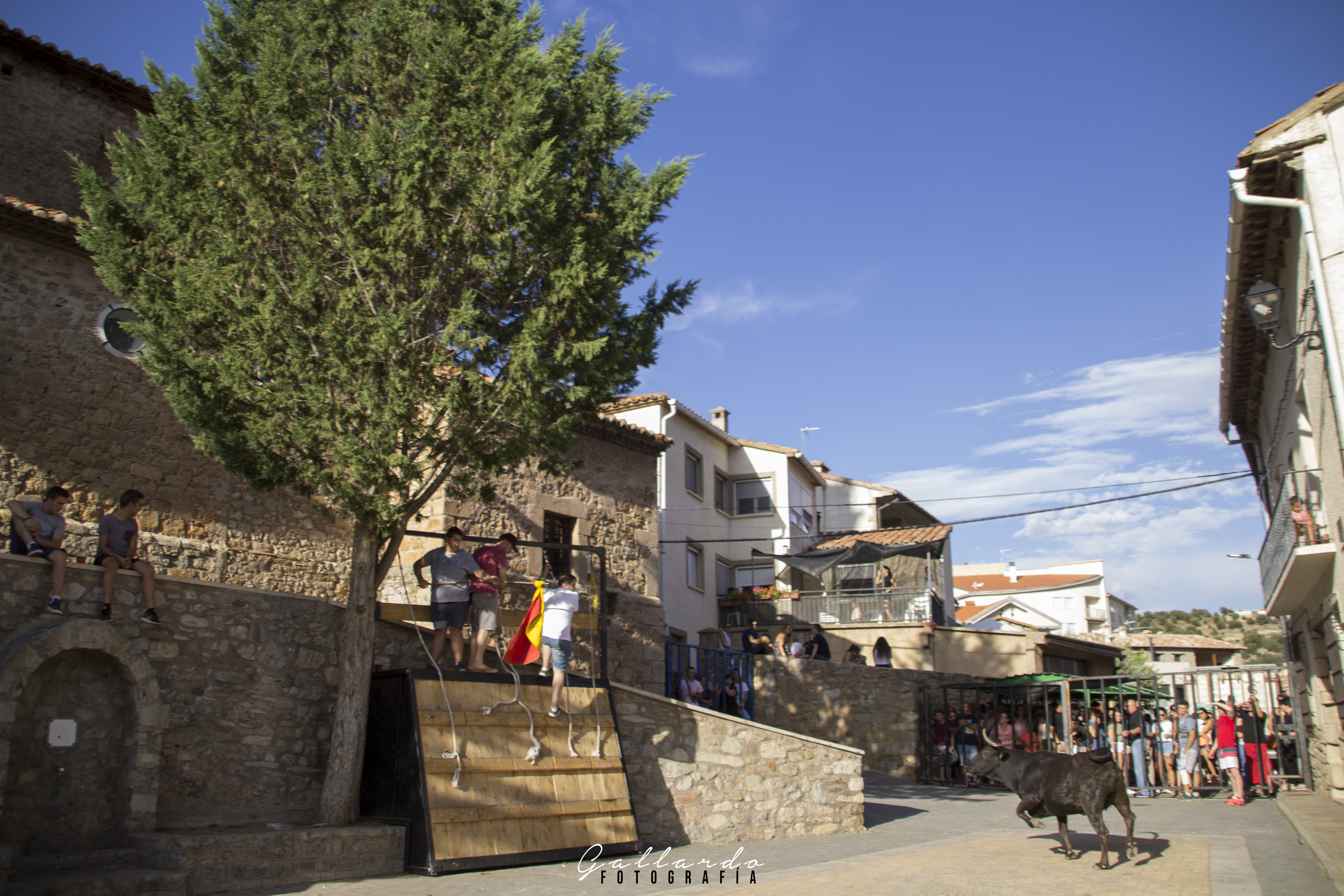 Tarde de vaquillas en la plaza del pueblo en las fiestas de San Roque 2019